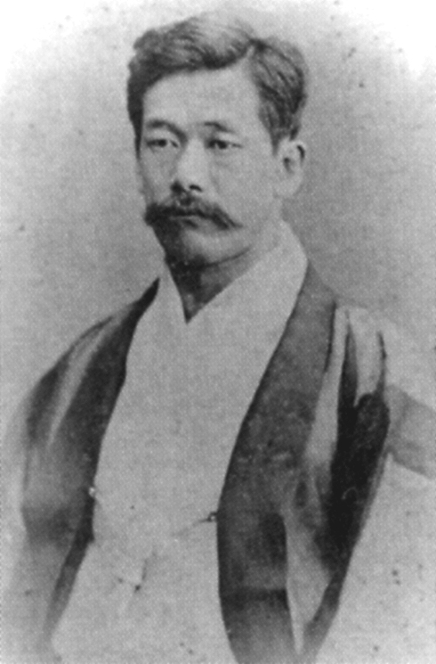 嘉納治五郎 日本の柔道家 28歳の頃の写真。